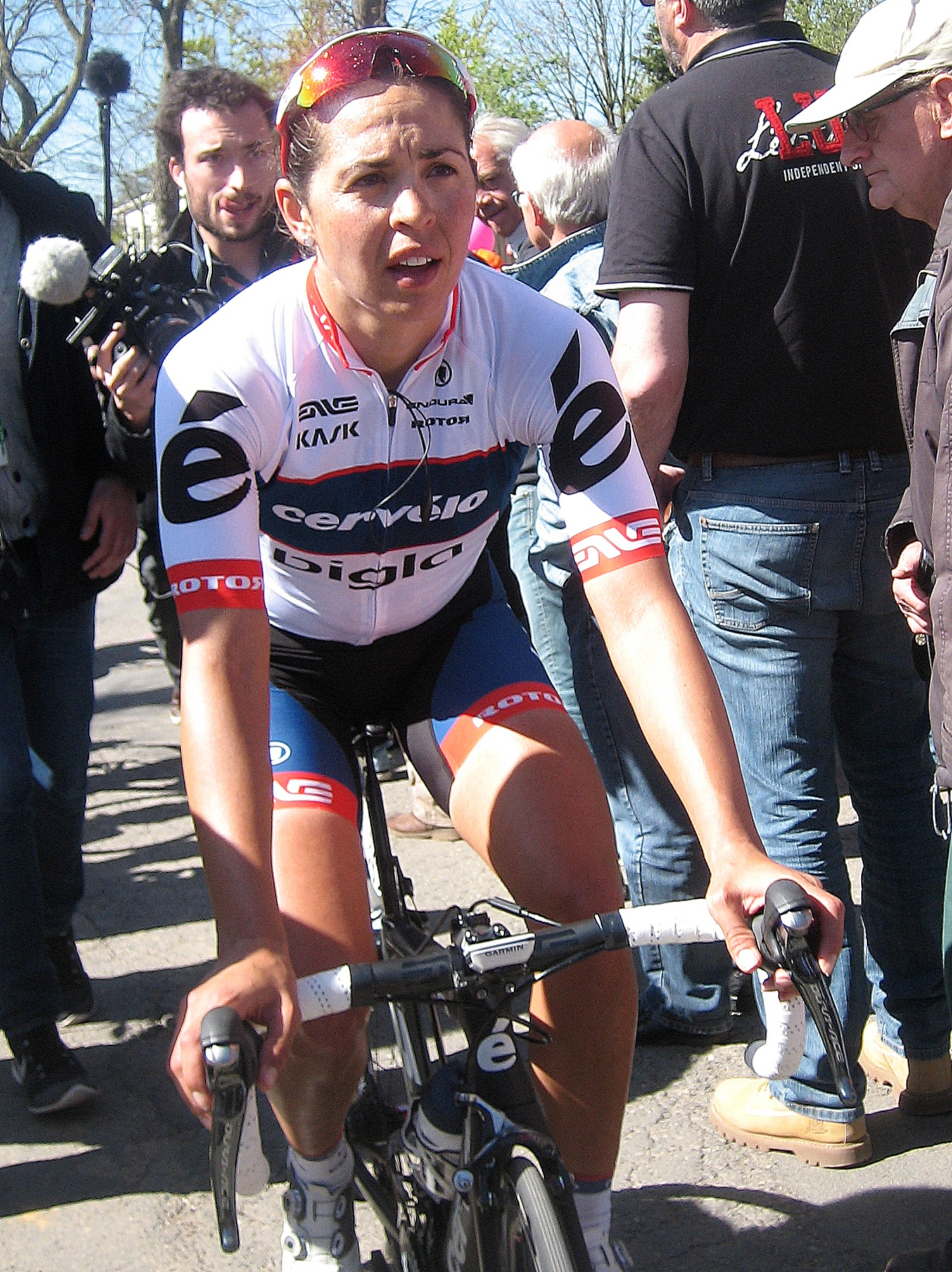 Carmen Small (Cervélo-Bigla) na finish Waalse Pijl 2016